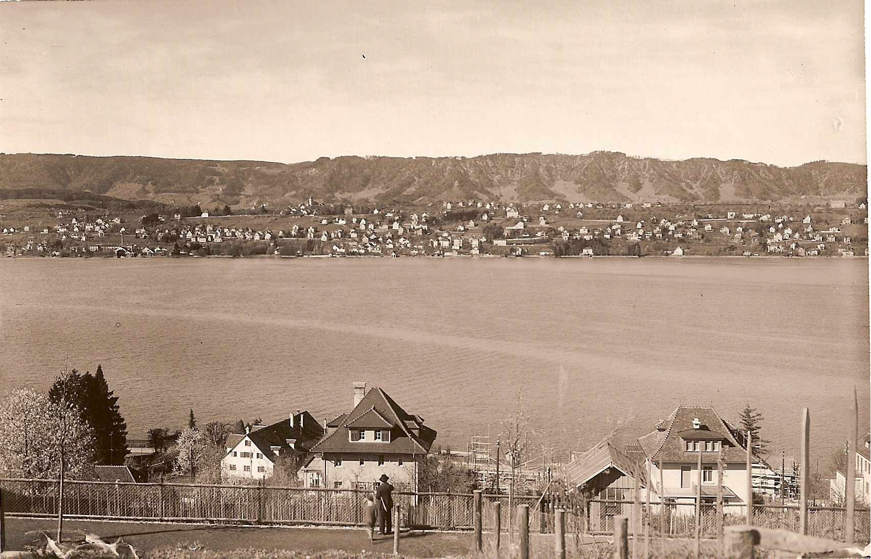 Kilchberg ZH, um 1925